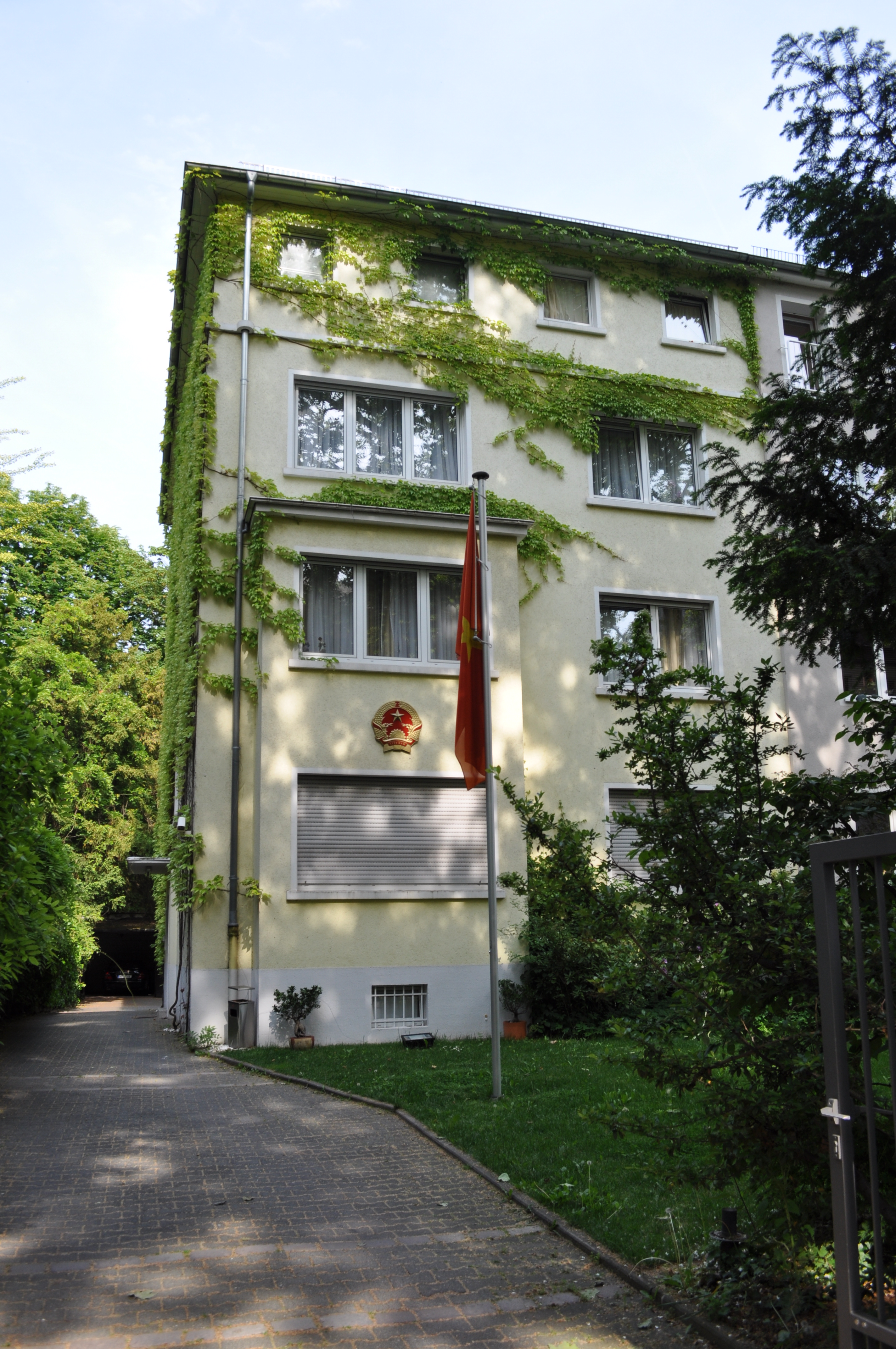 Das ehemalige Generalkonsulat Vietnams in Frankfurt am Main, Siesmayerstr. 10 (das Generalkonsulat ist inzwischen in die Kennedyallee umgezogen)